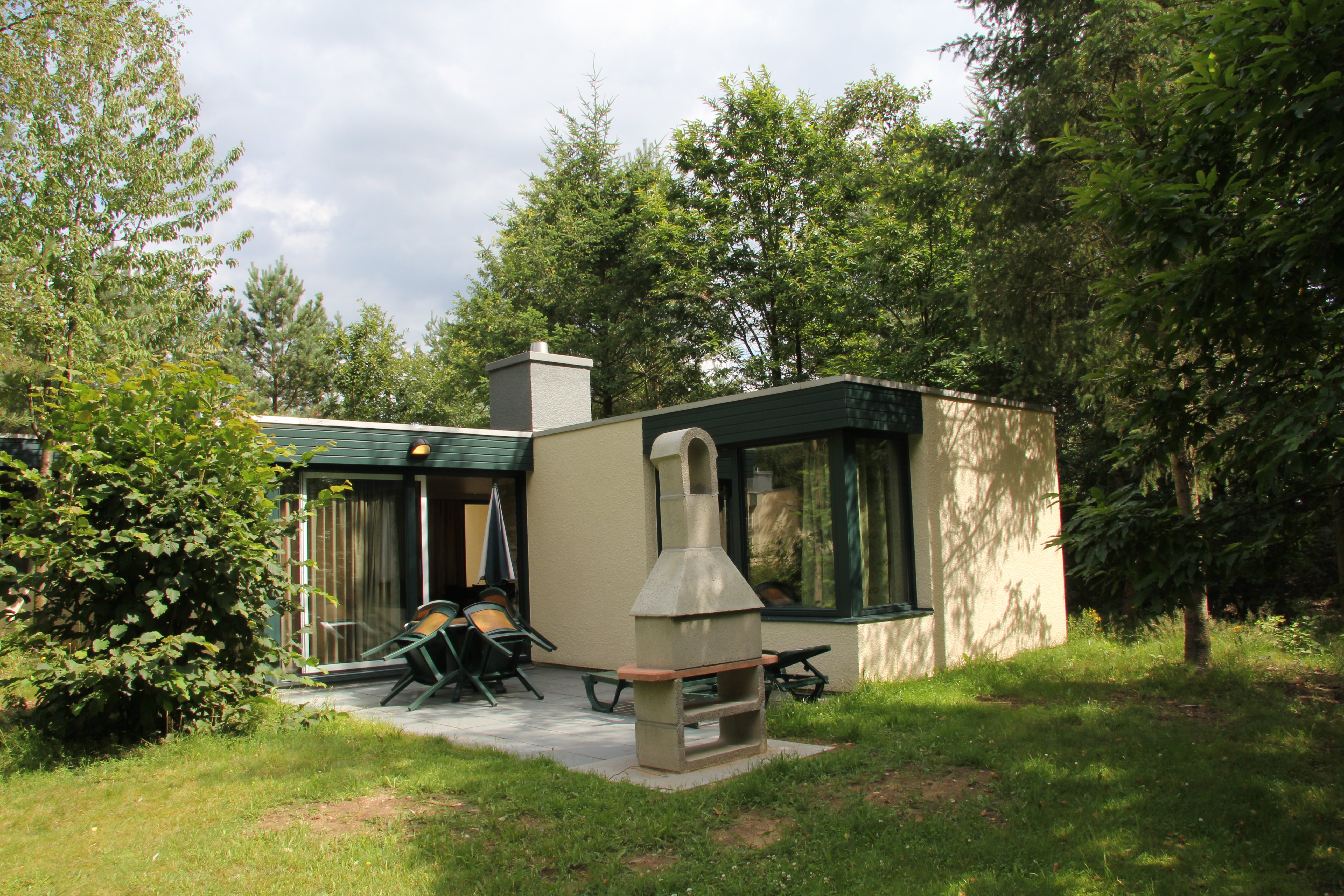 Centerparcs Bungalow "Bispinger Heide"